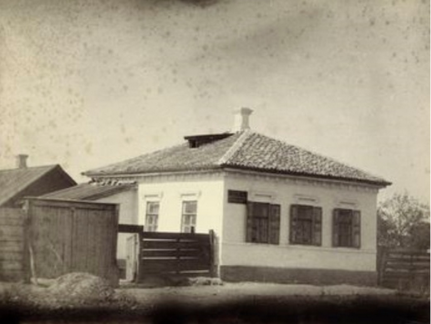 Таганрог Дом Иващенковой, подаренный ею для Палестинского общества